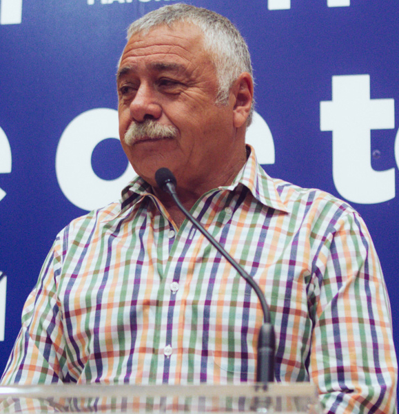 Carlos Caszely, exfutbolista chileno.